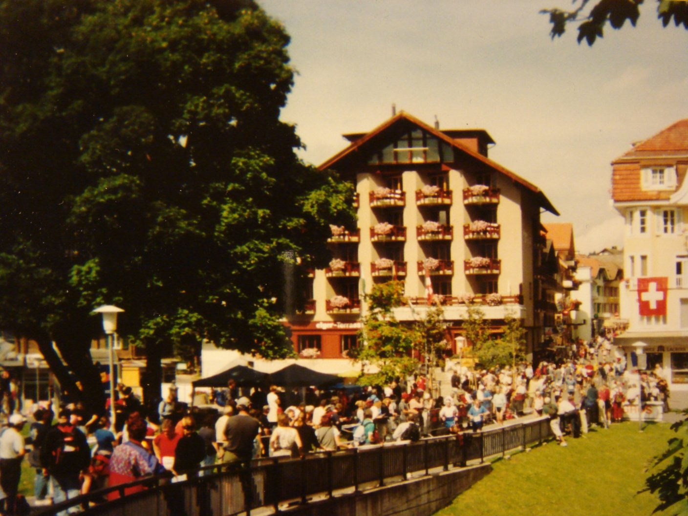 Maraton na vrchol Jungfrau ve Švýcarsku, 2004